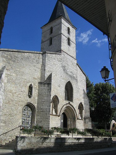 Assez majestueuse!